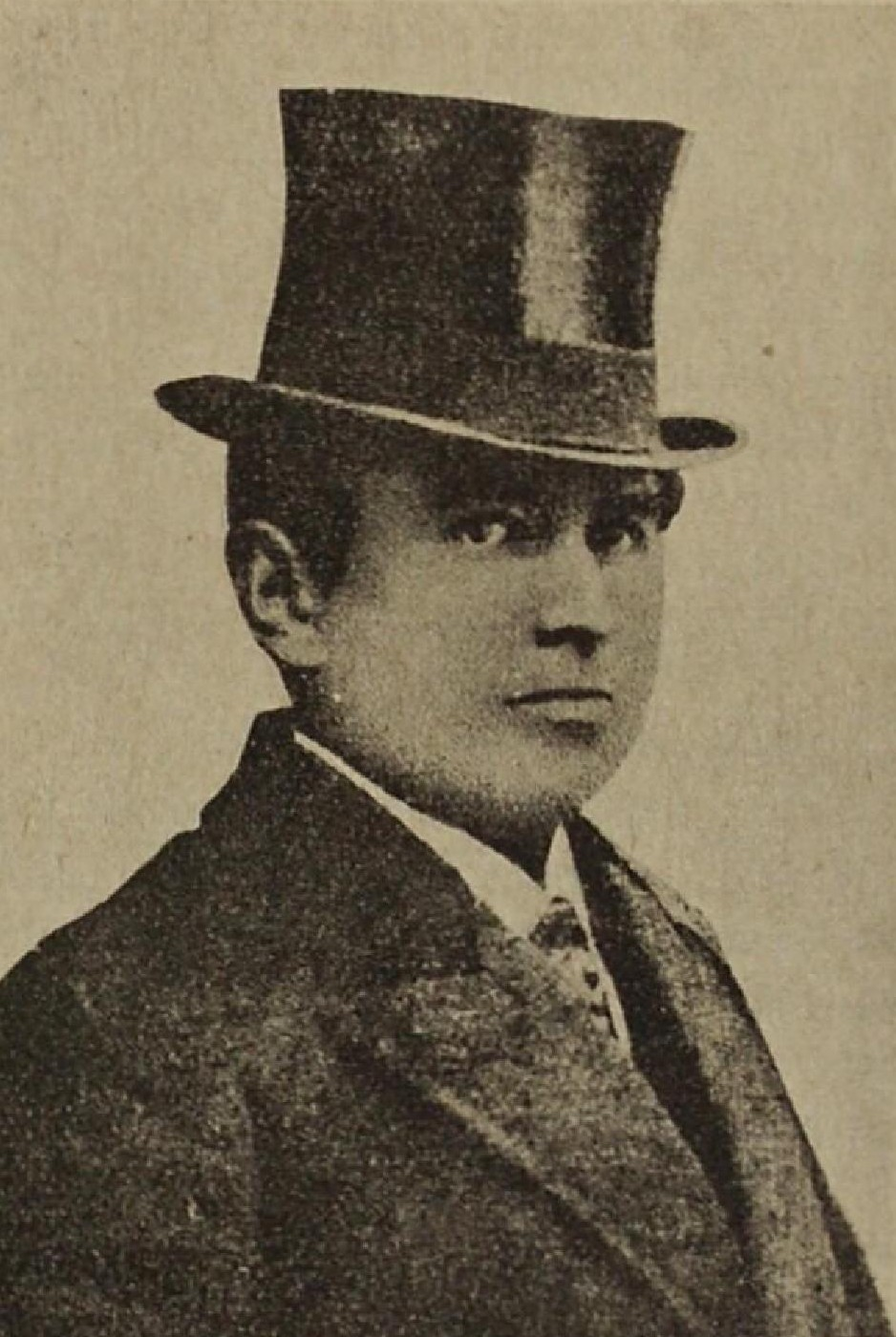 Václav Jiřikovský (1891-1942), český herec, režisér, dramaturg, divadelní ředitel a podnikatel